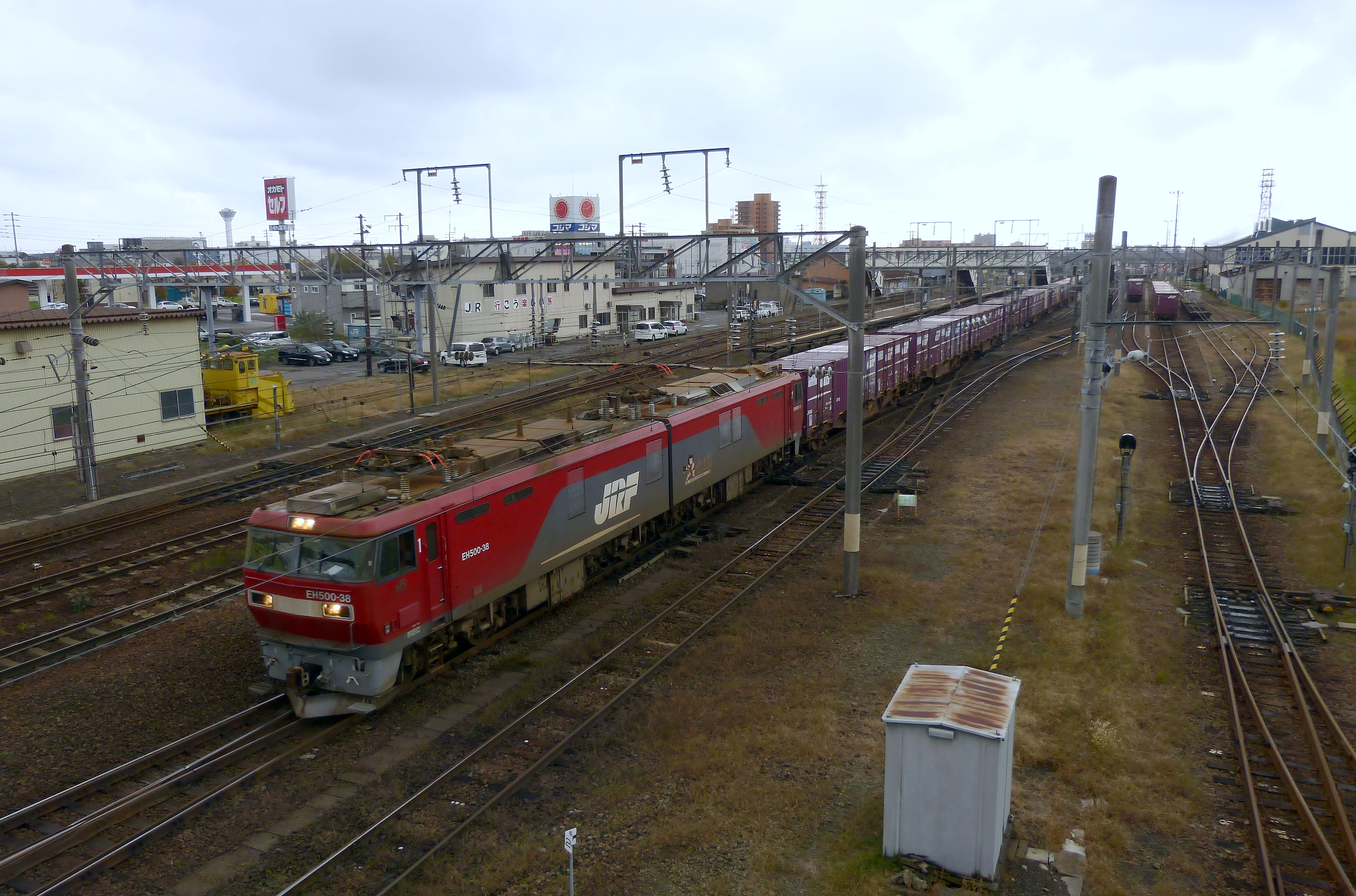 JR北海道の五稜郭駅を発車したJR貨物のEH500牽引の貨物列車。